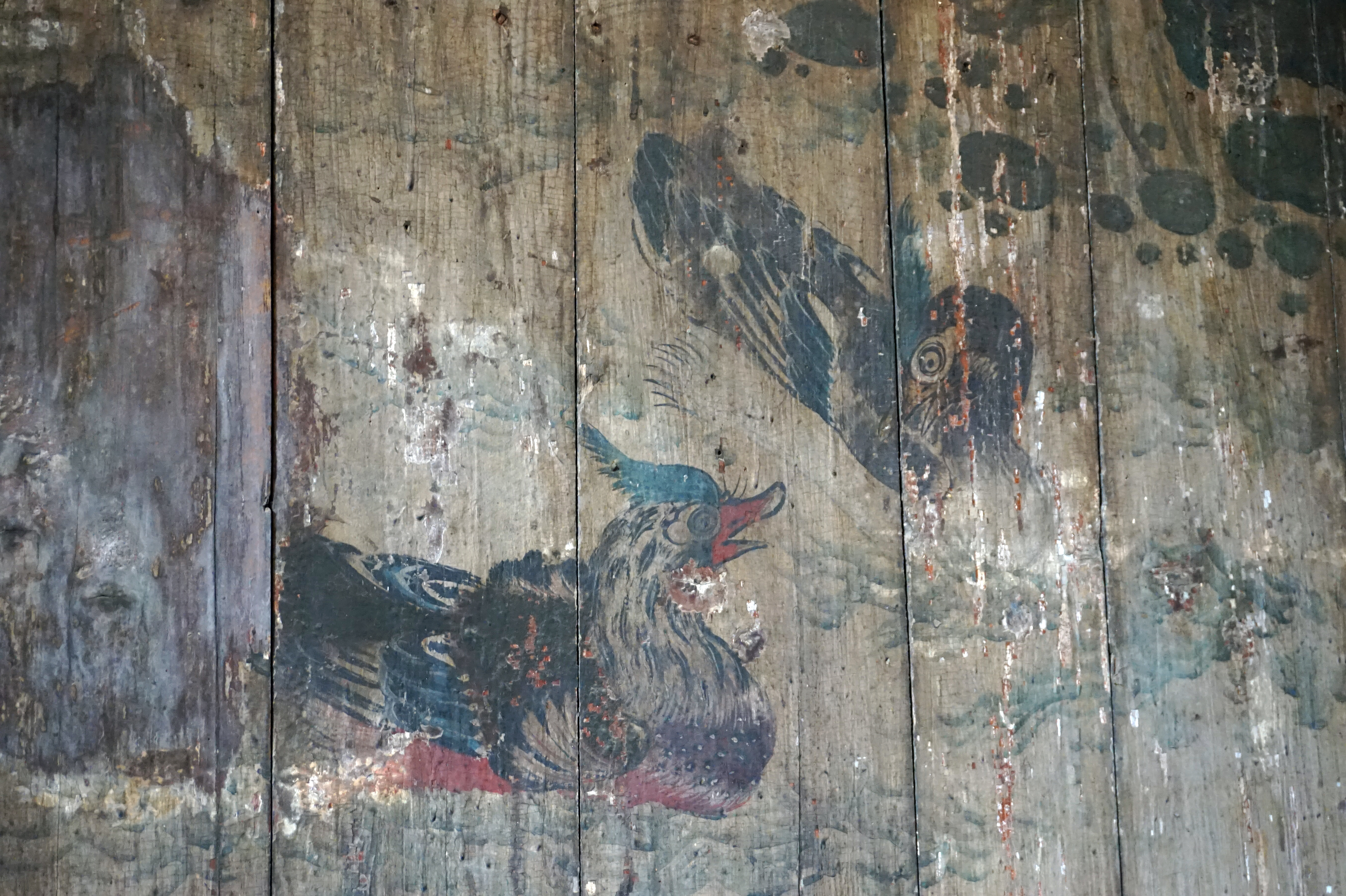 堂子街太平天国壁画艺术馆——鸳鸯荷花图，局部。